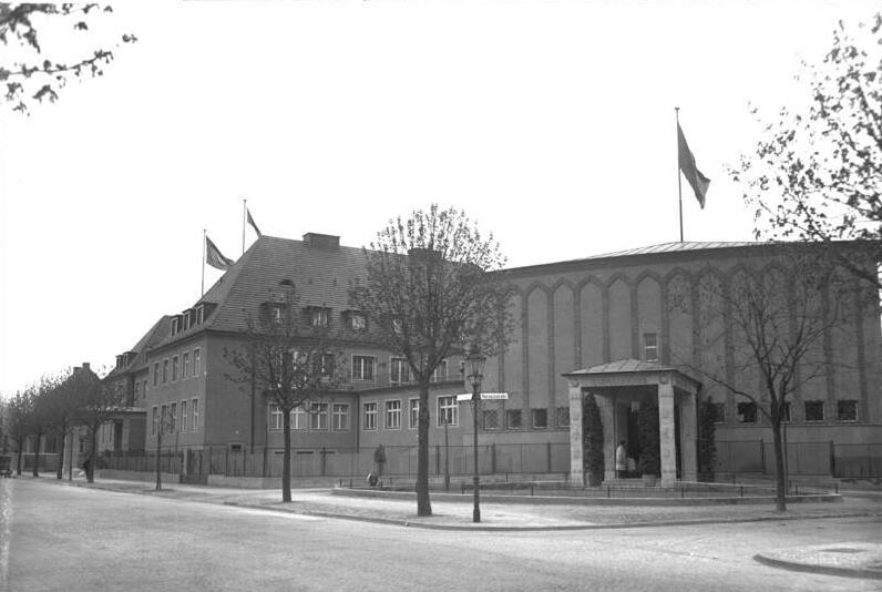 Die feierliche Einweihung des neuen Harnack-Hauses der Kaiser-Wilhelmgesellschaft zur Förderung der Wissenschaften in Berlin-Dahlem. Aussenansicht des neuen Harnack-Hauses der Kaiser-Wilhelmgesellschaft in Berlin-Dahlem nach der Einweihung.